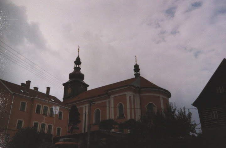 Kostel svatého Václava, Srbská Kamenice.